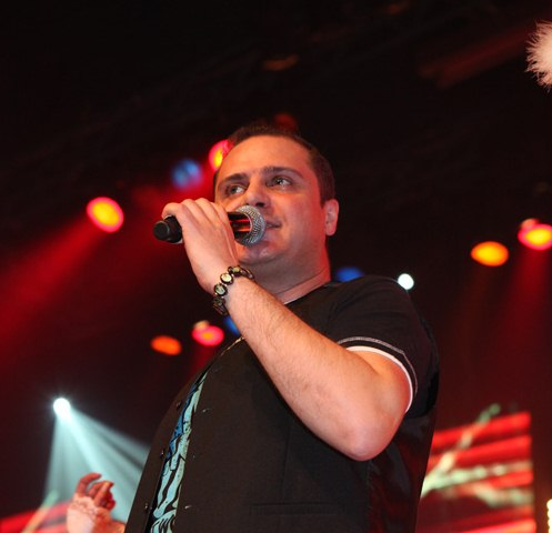 Nino Porzio in una foto scattata da me, il 17 Febraio 2012 a Colonia.